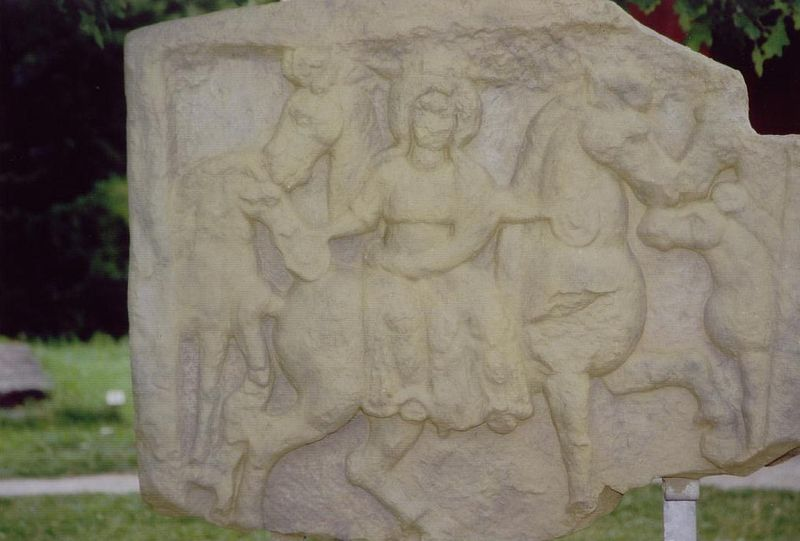 Pferdegöttin Epona. Dieses Bild wurde in Kempten (APC) fotografiert.